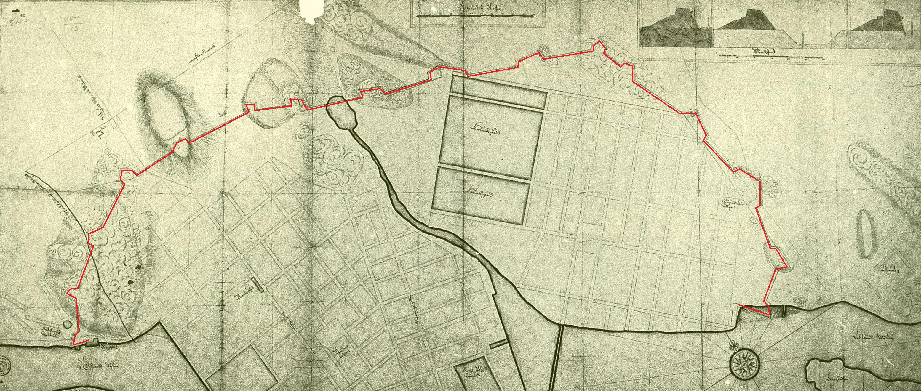 Provisorisk försvarsverk (ifyllt med rött) kring Norrmalm och Ladugårdsgärde